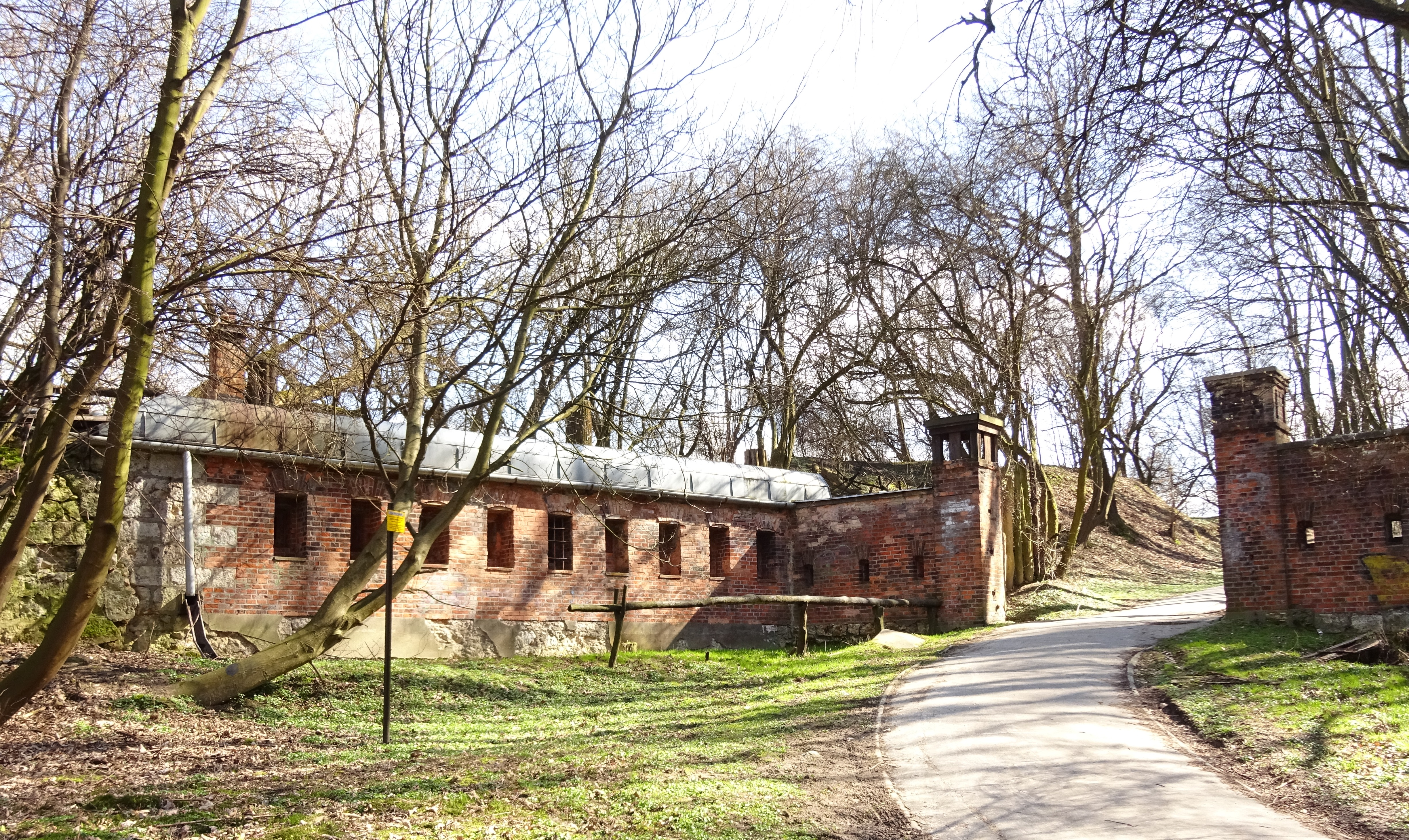 Ostroga bramna 3A do Fortu Kościuszko w Krakowie.